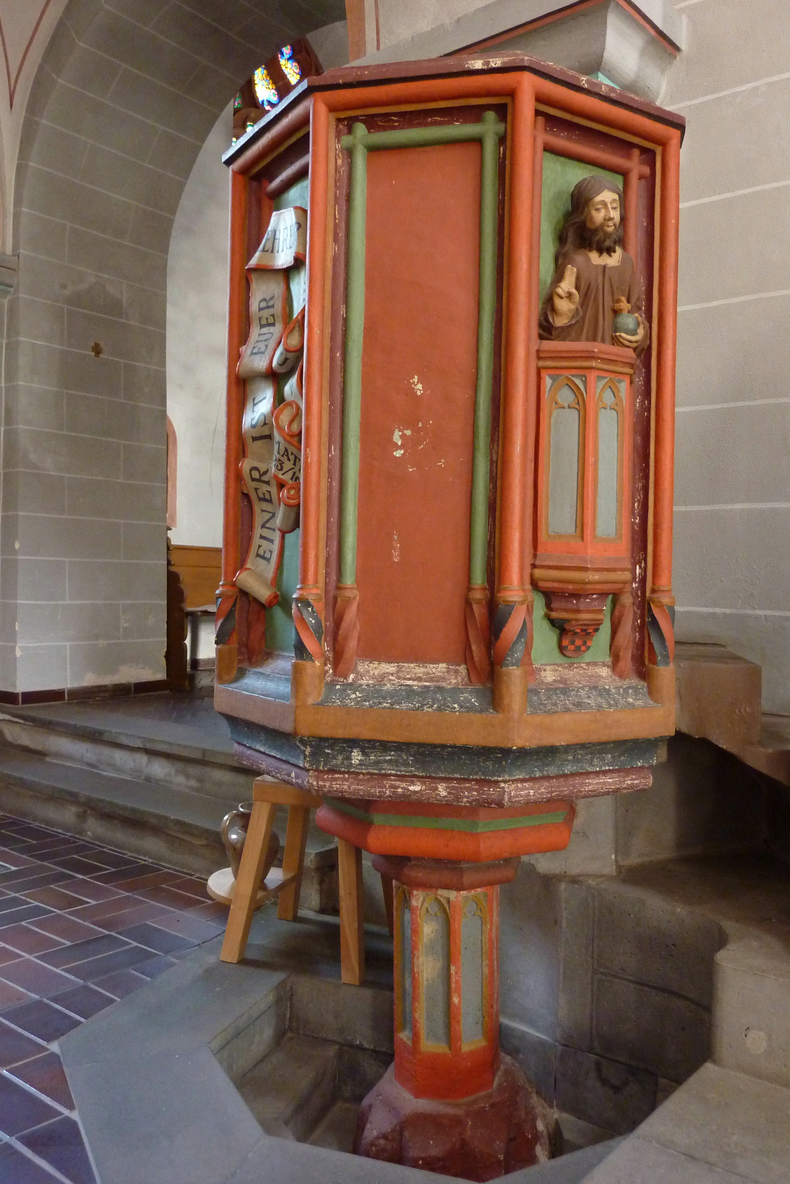 katholische Pfarrkirche St. Gangolf in Mertloch, Kanzel